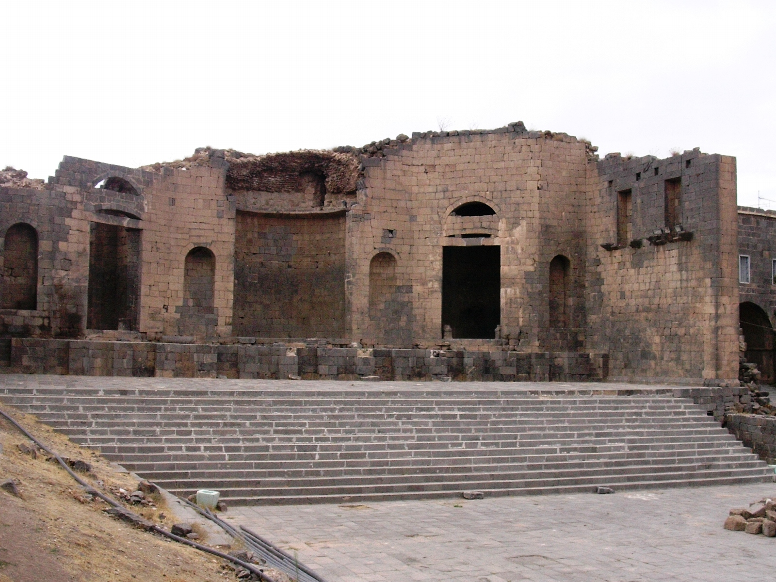 Shahba Forum